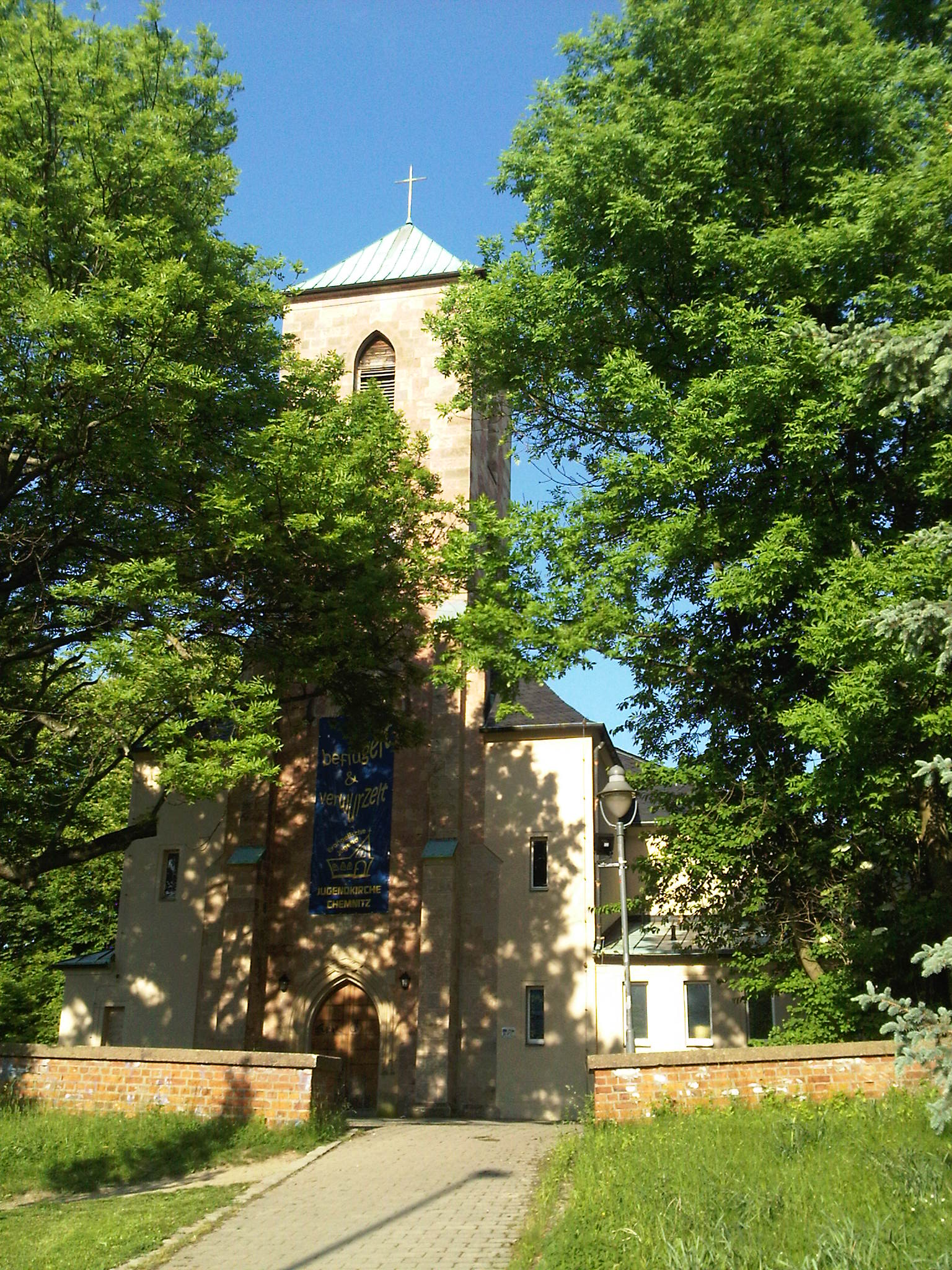 Johanniskirche in Chemnitz am Park der Opfer des Faschismus